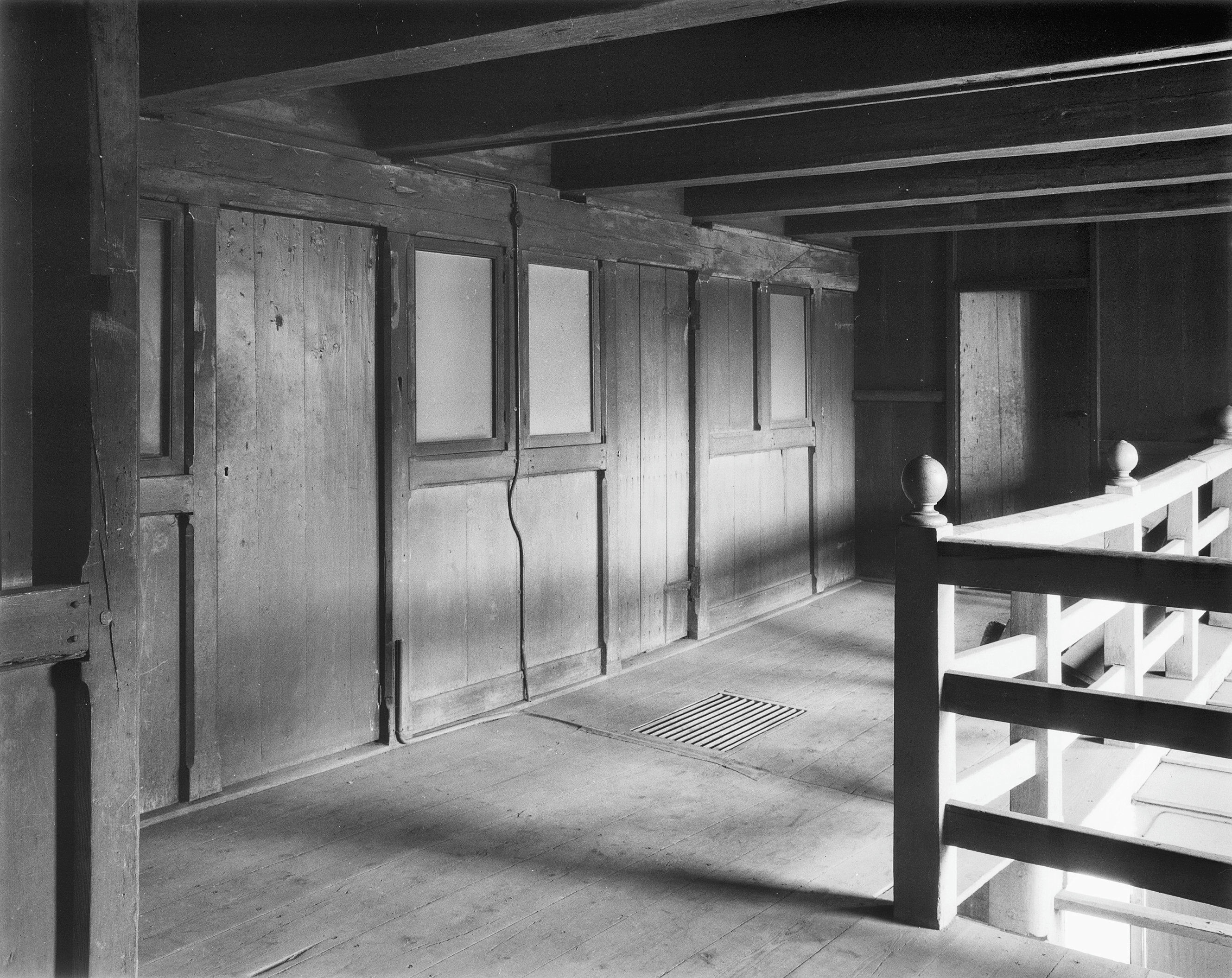 Lutherse Kerk: zo geheten Dolhuis boven koor